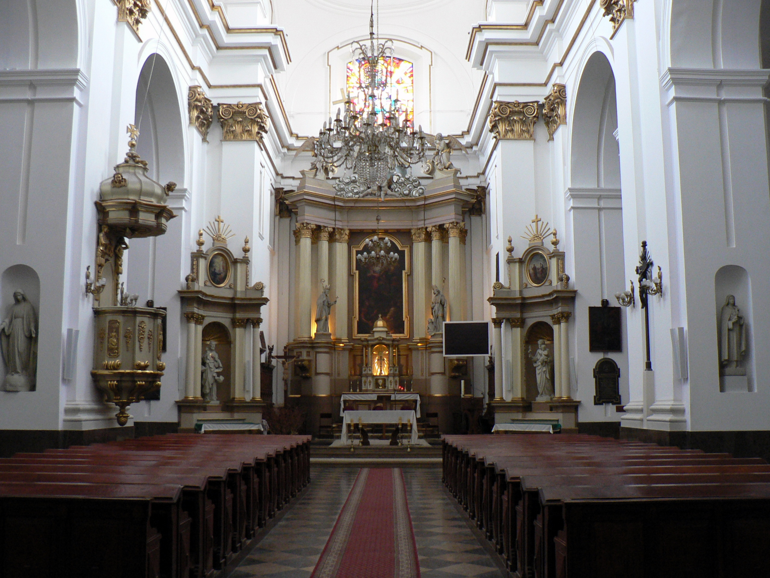 Warszawa, kościół św. Ducha przy ul. Freta